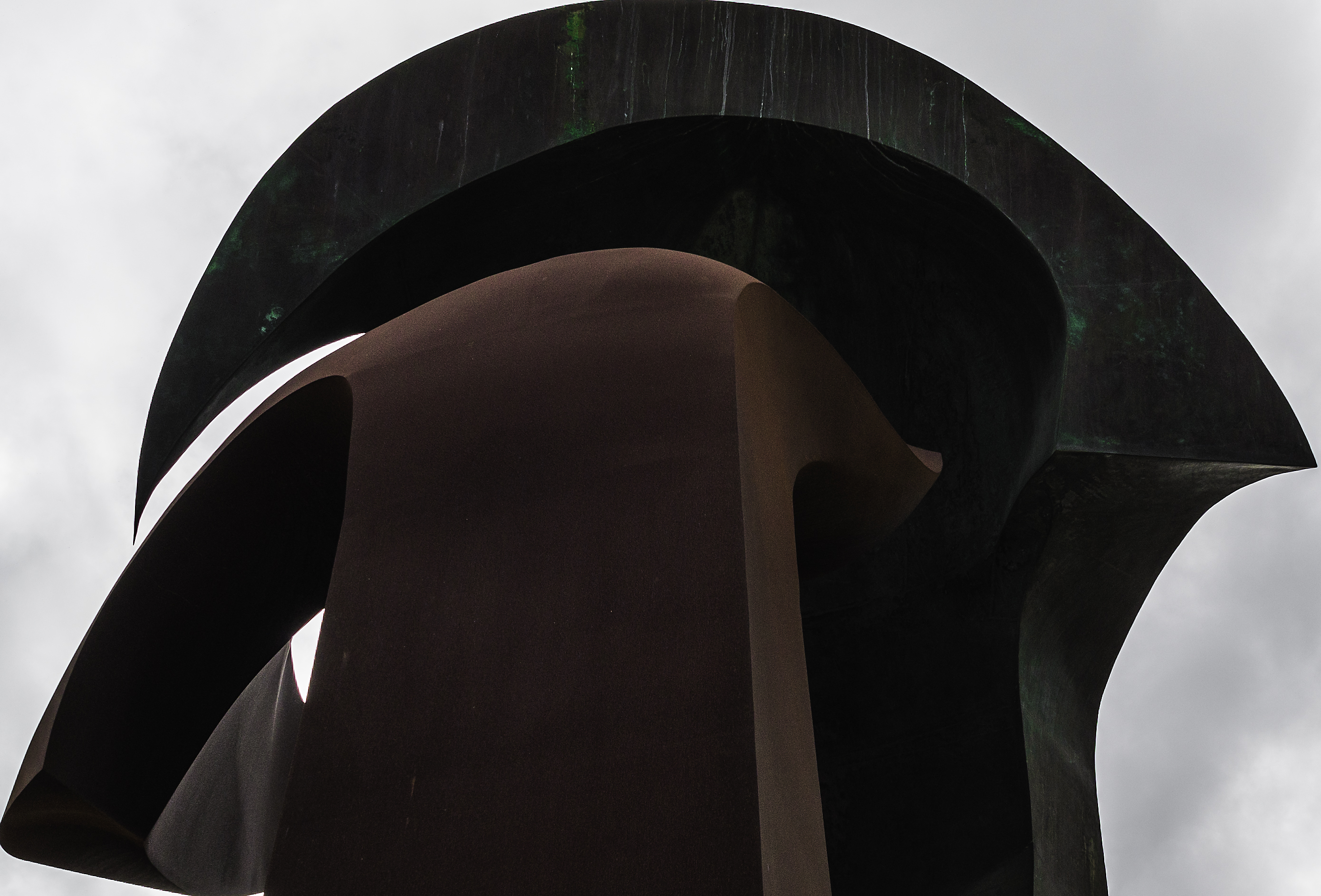 Encuentros (Escultura de Mustafa Arruf, 1997) Conmemoración del V Centenario de la fundación española de Melilla.